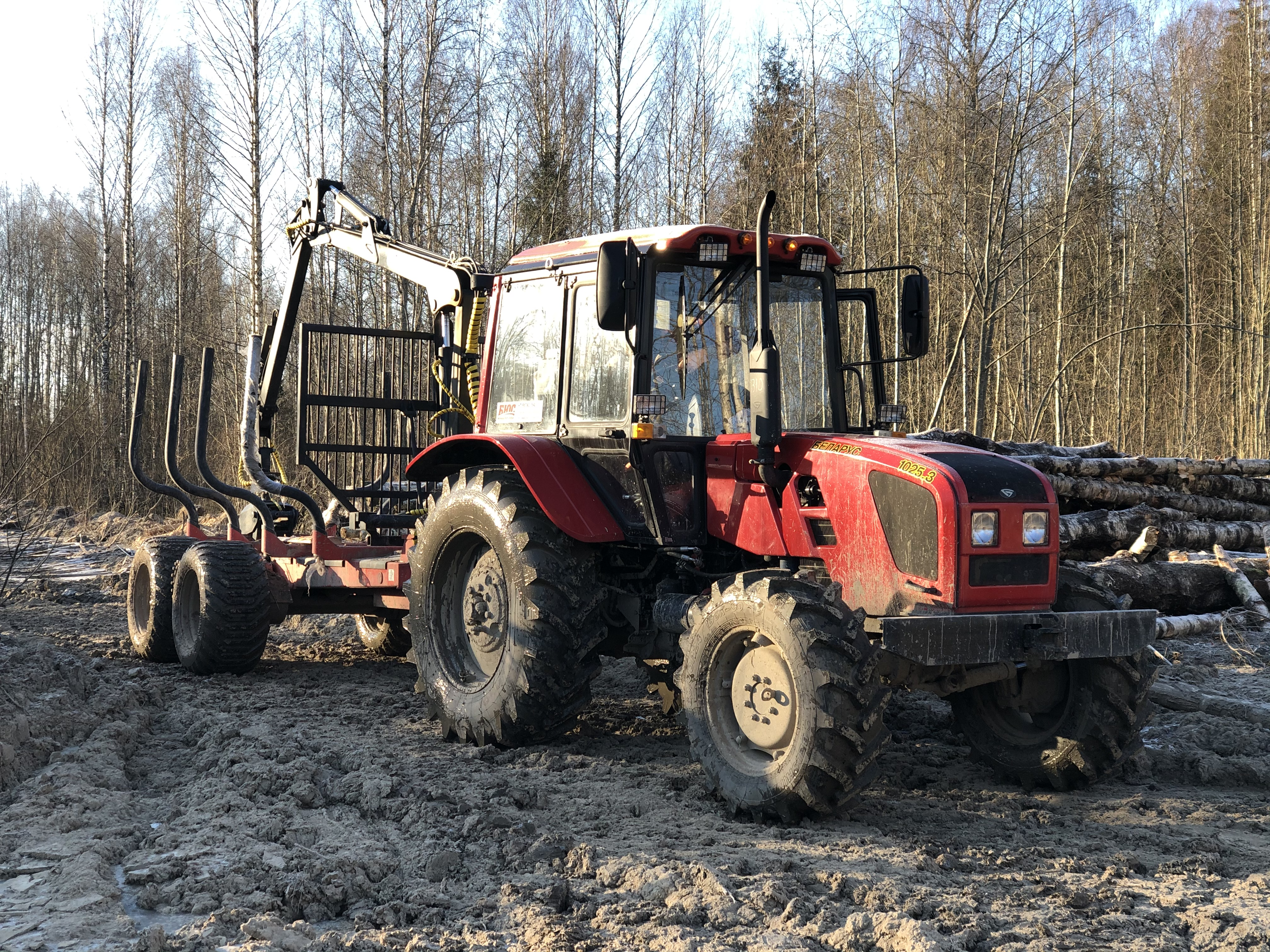 Лесозаготовительный прицеп с полным приводом